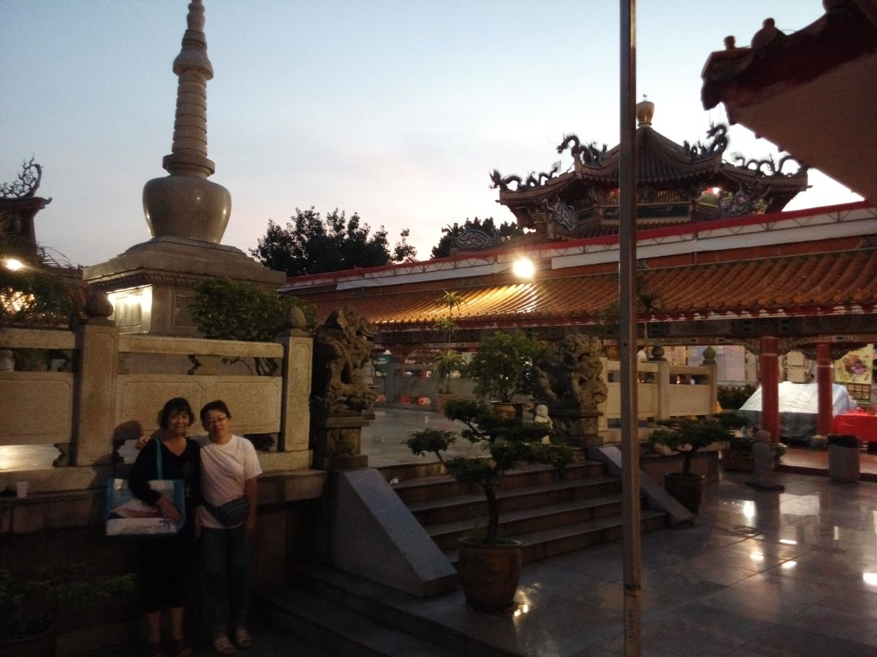 新加坡位於光明山普覺禪寺的覆钵式塔